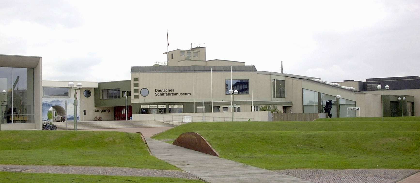 Historical building in Bremerhaven, northern Germany German Shipping Museum Native nameDeutsches SchifffahrtsmuseumParent institutionLeibniz AssociationLocationHans-Scharoun-Platz 1 27568 Bremerhaven GermanyCoordinates53° 32′ 24.36″ N, 8° 34′ 37.2″ E Established5 September 1975Web pageDeutsches SchifffahrtsmuseumAuthority control : Q455354 VIAF: 128715457 ISNI: 0000 0001 2256 5668 LCCN: n50065866 NLA: 35745010 GND: 2008892-9 WorldCat Hans-Scharoun-Platz 1/3, 1971-75 von Hans Scharoun und Peter Fromlowitz Das abgebildete Objekt ist ein geschütztes Kulturdenkmal in der Freien Hansestadt Bremen, mit der Nr. 1737,T beim Landesamt für Denkmalpflege registriert.